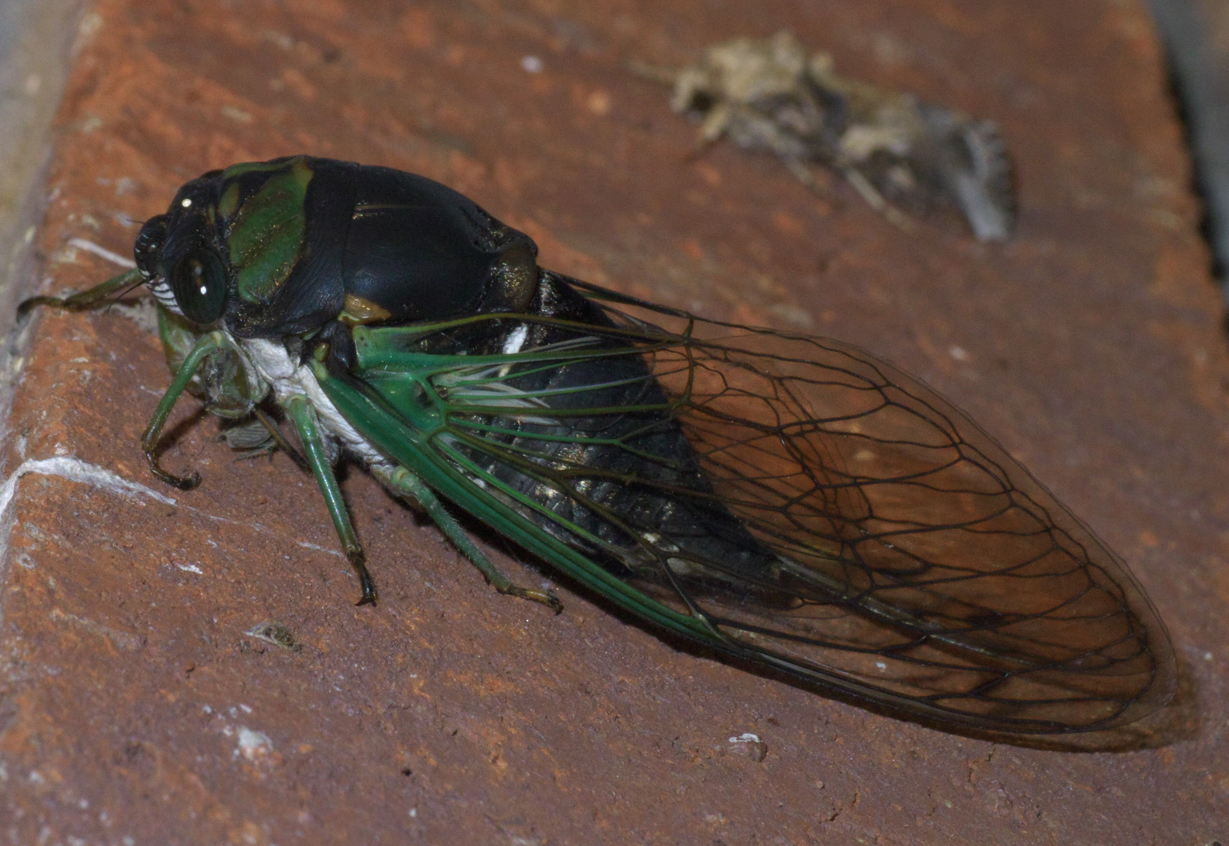 Neotibicen tibicen, swamp cicada, ID Confidence: 88